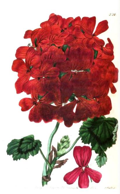 Pelargonium fothergilli, Fothergill's ciconium